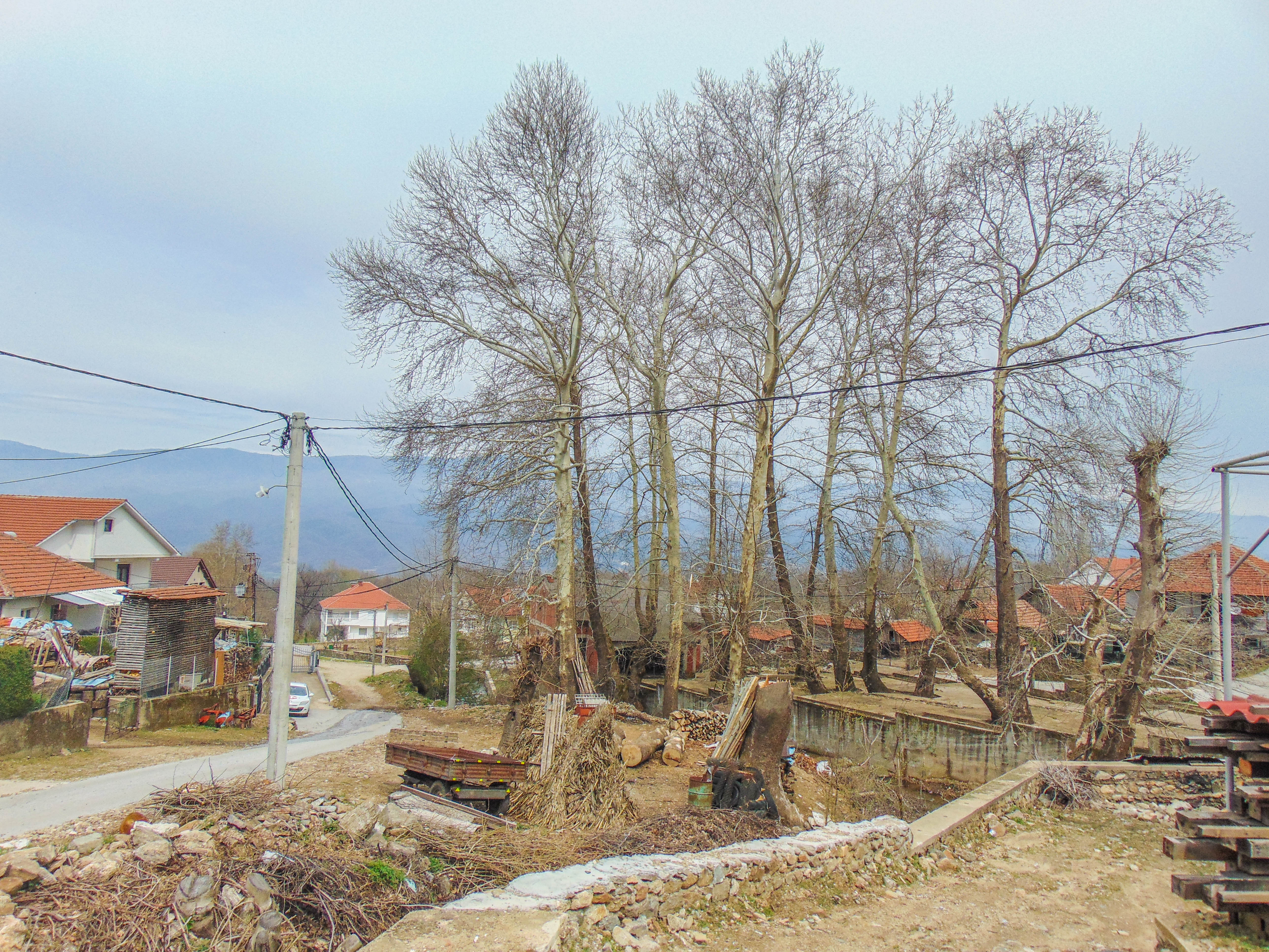 Старо Коњарево